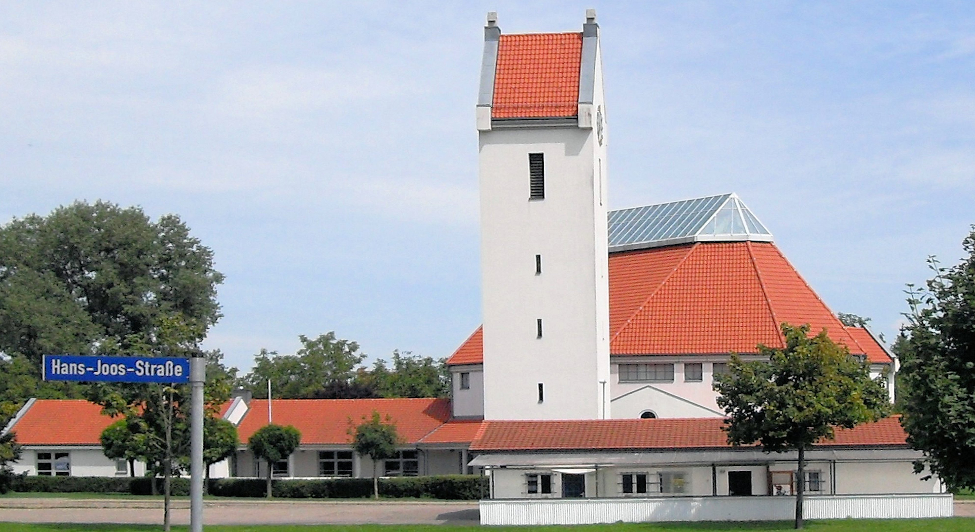 Katholische Kirche St. Blasius in Schallstadt-Wolfenweiler